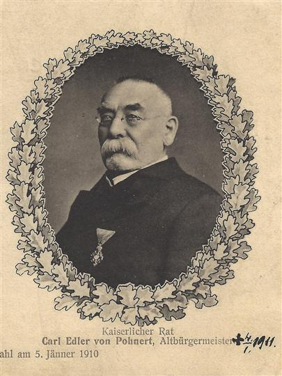 Karl Pohnert (1832 - 1911), Rakouský politik.